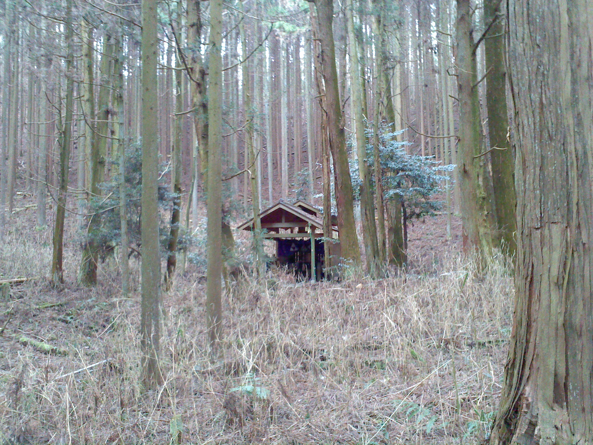 如意ヶ嶽・雨神社。